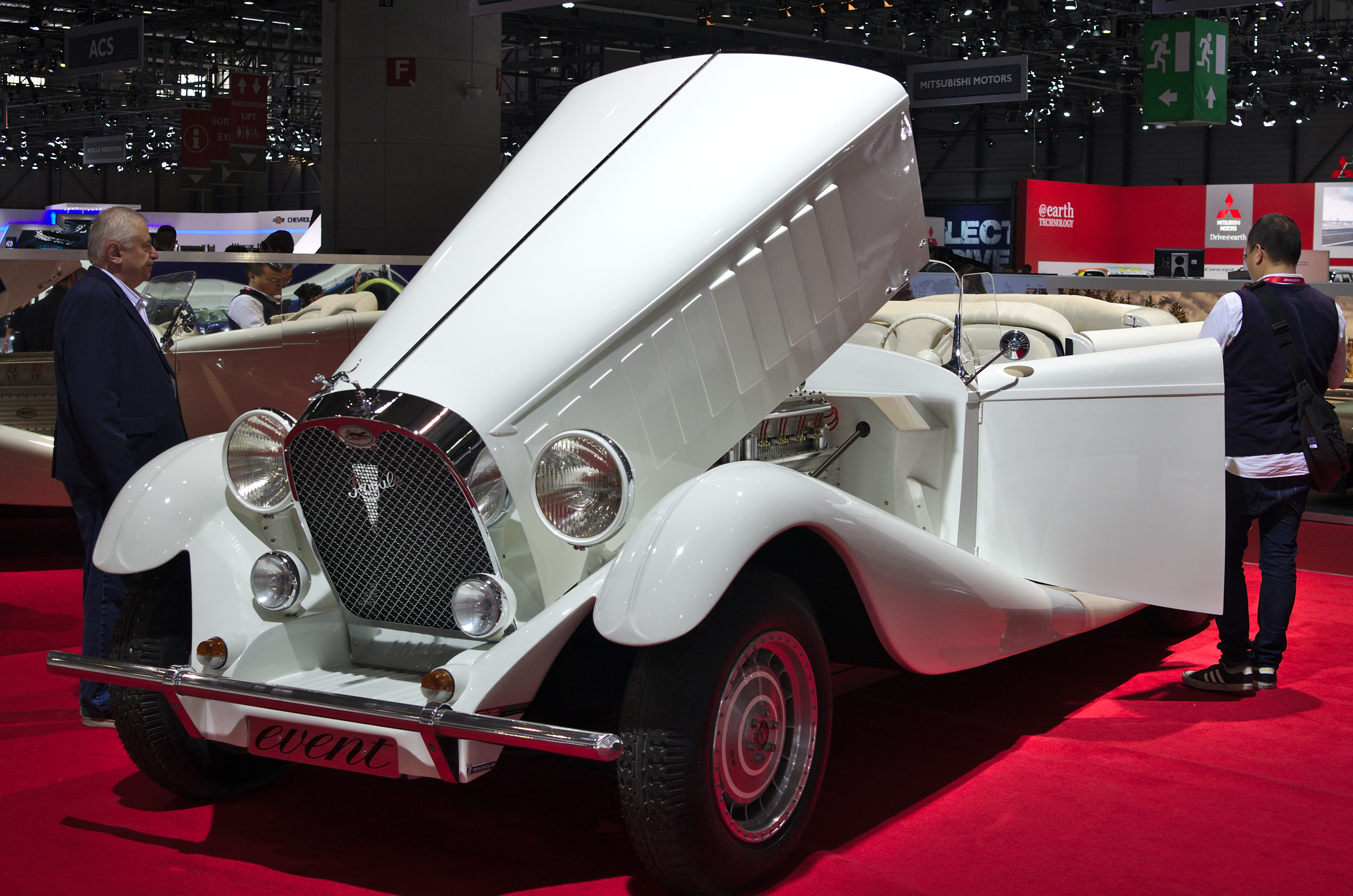 Salon de l'auto de Genève 2014 - 20140305 - Sbarro Royale